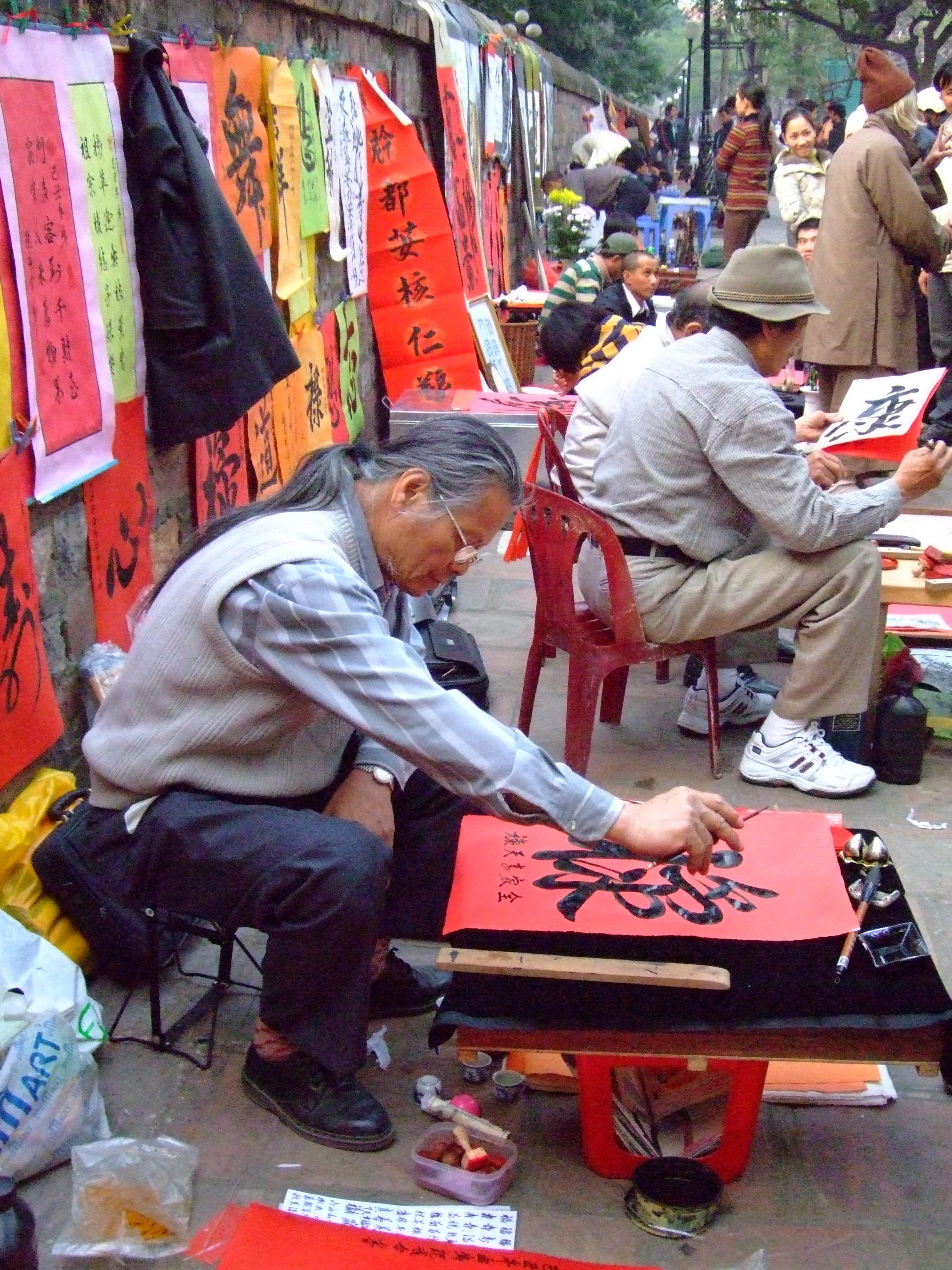 越南新年Tet前，文庙外热闹的场景，以买卖中文福贴为主，可惜没多少越南人会读了